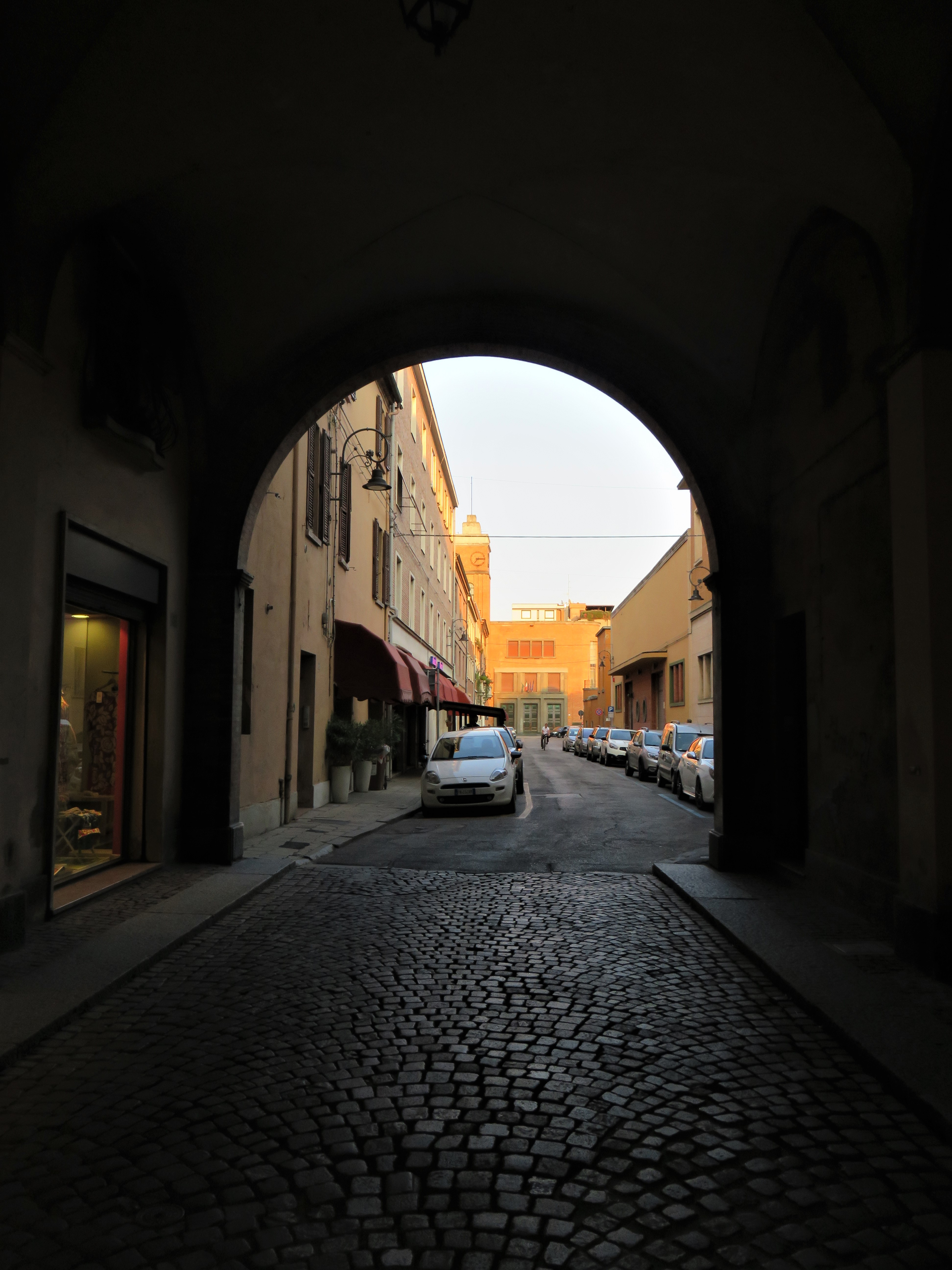 Via previati a Ferrara vista da via Borgo dei Leoni. Scuola Alda Costa e, sulla destra, la Sala Boldini